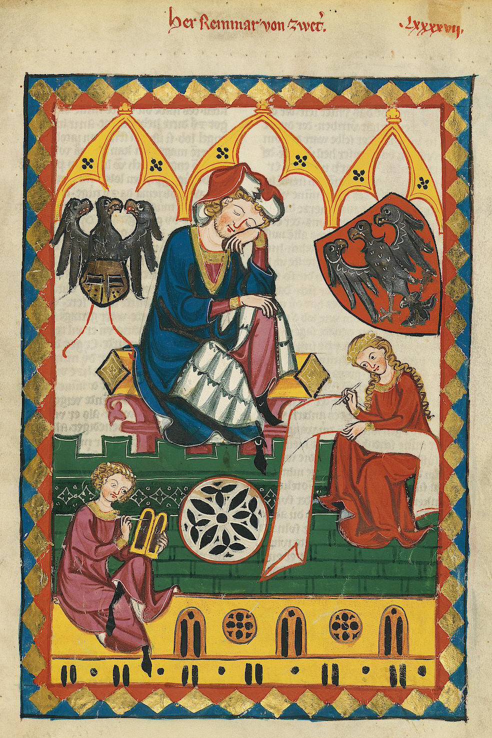 Codex Manesse, UB Heidelberg, Cod. Pal. germ. 848, fol. 323r: Herr Reinmar von Zweter